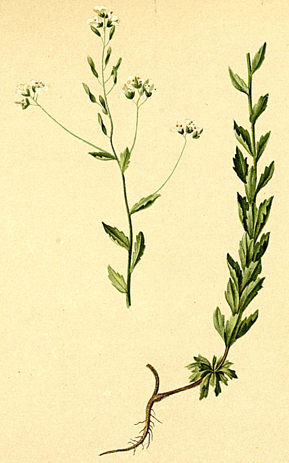 Draba incana